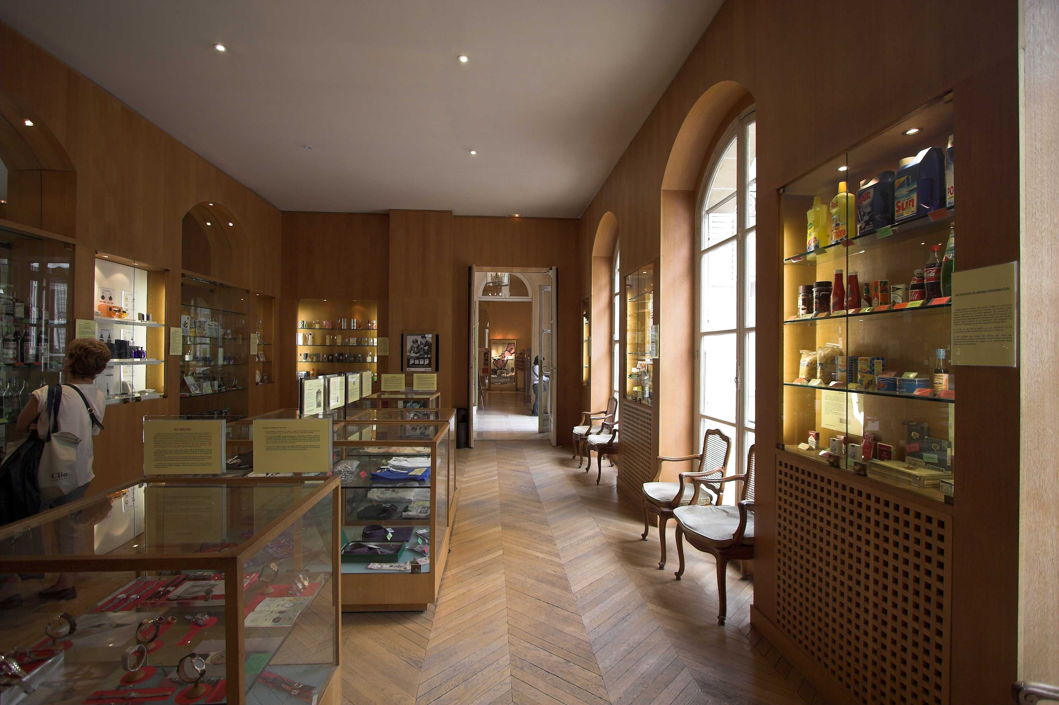 Musée de la Contrefaçon(Paris, France)